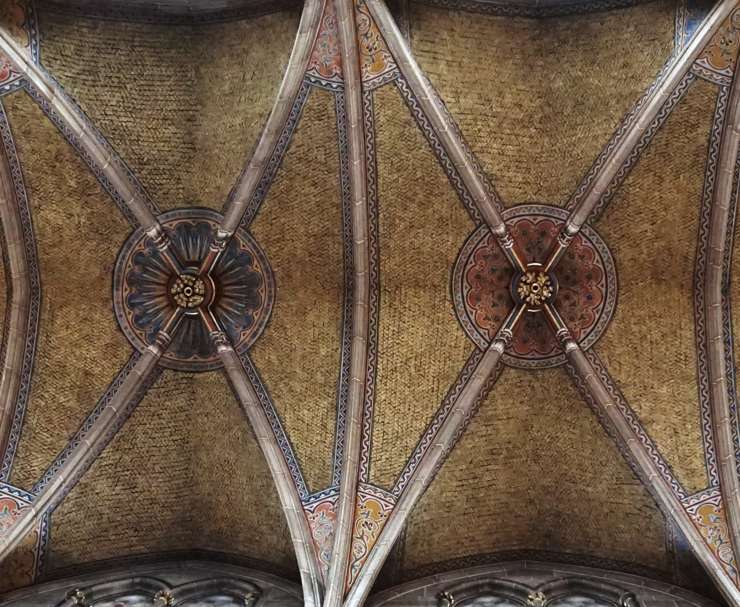 Teilansicht des korkbeklebten Gewölbes in der Marienkirche (Reutlingen)